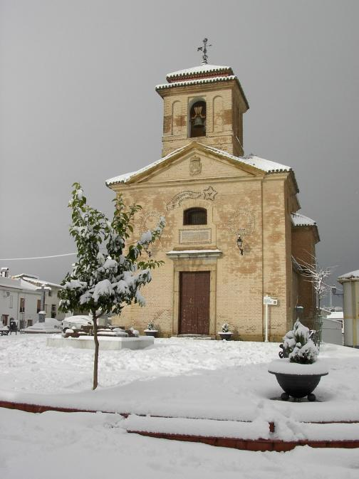 Iglesia de Nívar, en Granada (España)